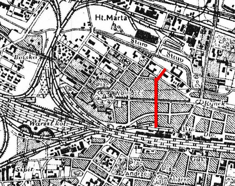 Mapa ulicy Stawowej w Katowicach (zaznaczona czerwoną linią) na fragmencie mapy Wojskowego Instytutu Geograficznego w Warszawie z roku 1933 (PAS 47 - SŁUP 28 - H)